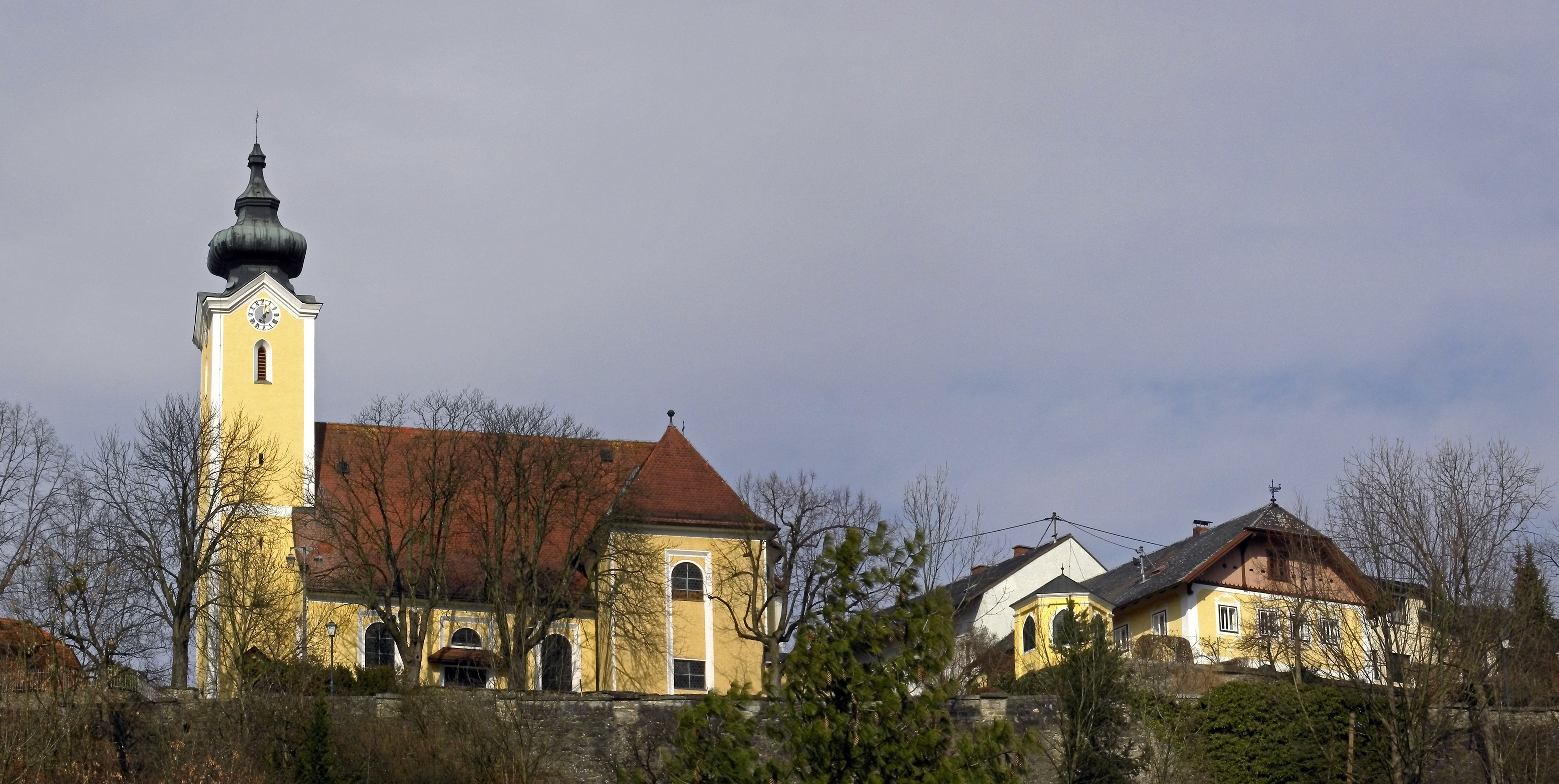 Kath. Pfarrkirche St. Magdalena und Pfarrhof mit Gartenpavillon